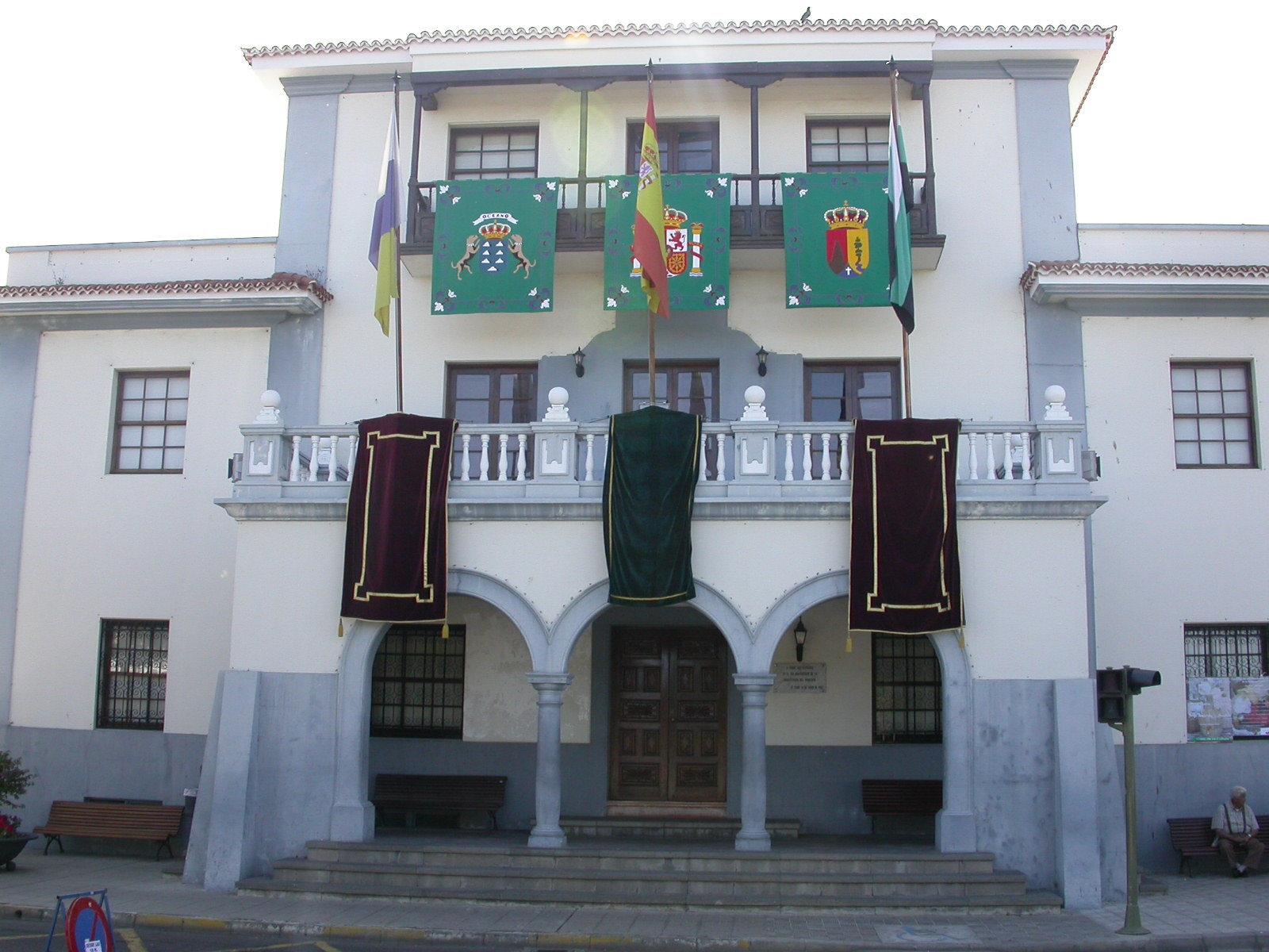 Fachada del Ayuntamiento del municipio de El Paso (La Palma)